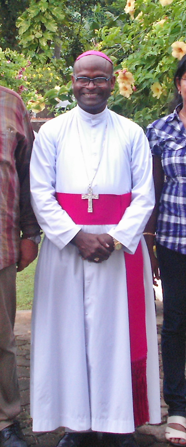 Bishop Selvister Ponnumuthan from Punalur, Kerala (* 1956)